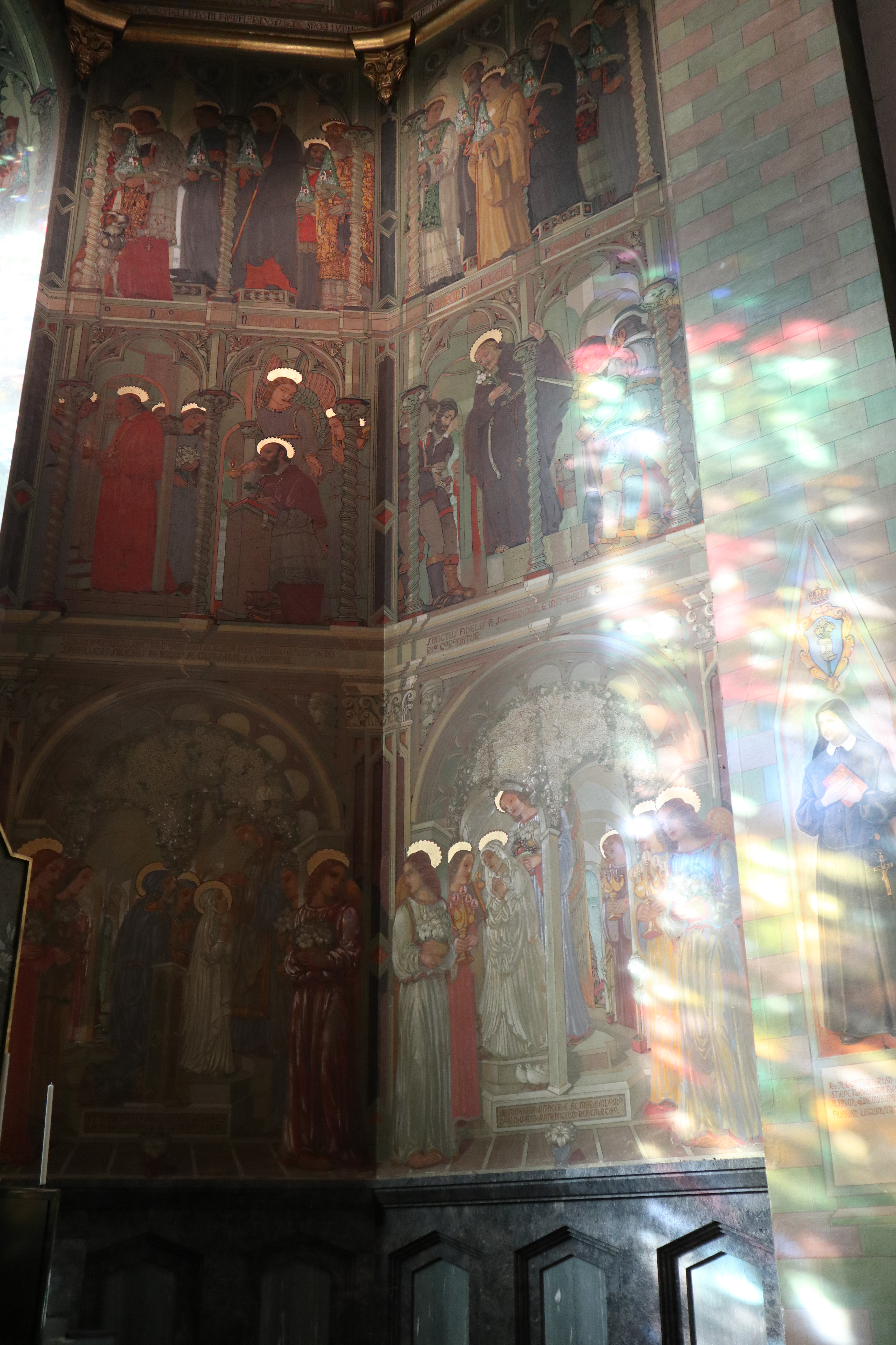 Cappella Svizzera: Affreschi di Carlo Donati con Santi Svizzeri, in alto, e Storie dei Santi Anna e Gioacchino, in basso; 1935-38